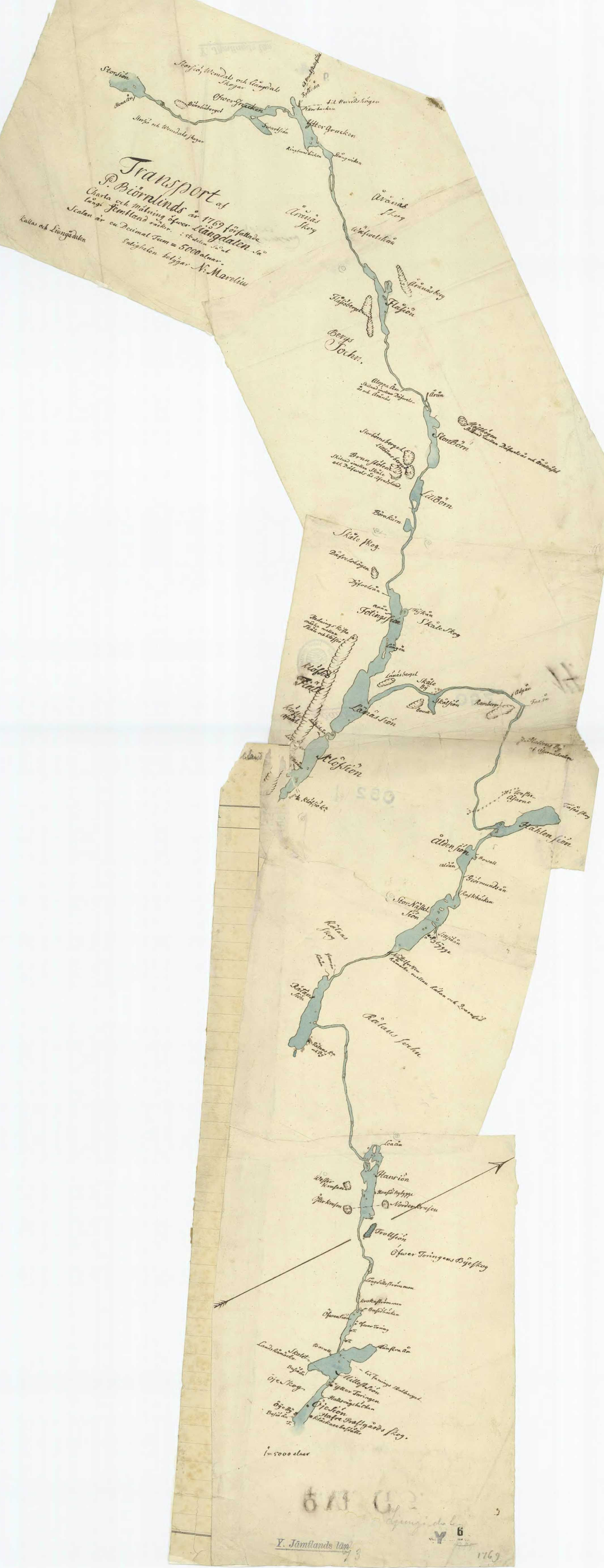 Transportledskarta över Ljungan från Storsjön till Kyrksjön vid Haverö av P Biörnlind.